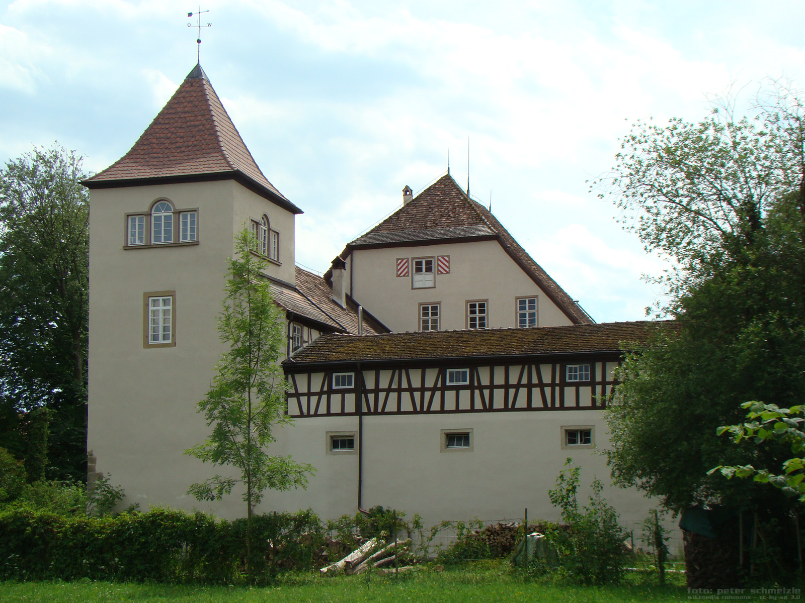 Obersulm-Weiler, Schloss